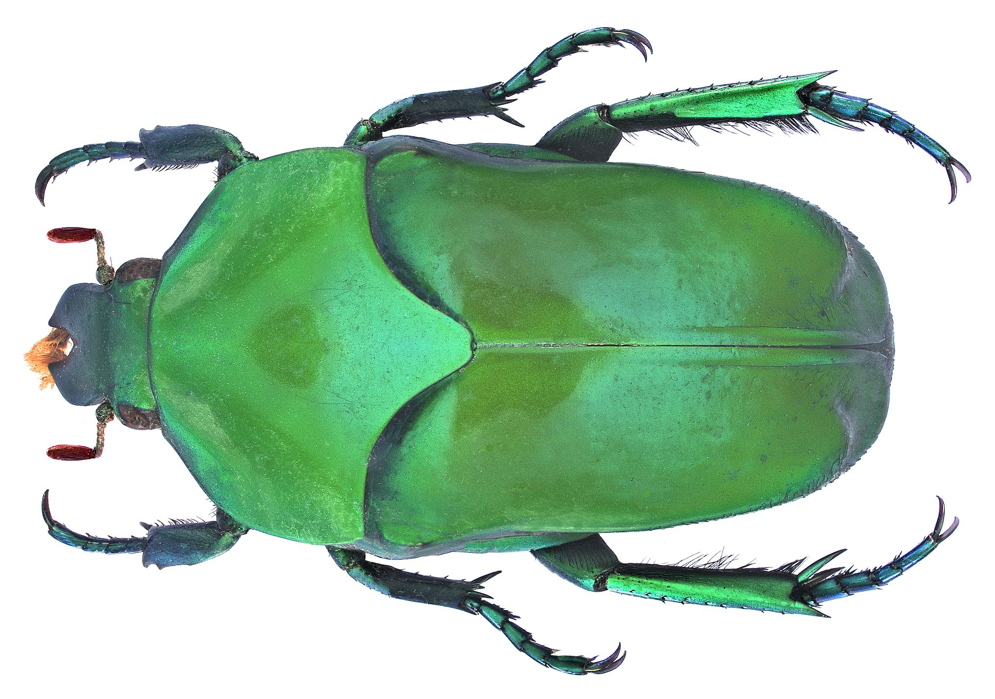 Familie: Scarabaeidae Grösse: 25,3-30,8 mm Fundort: Indonesien, Irian Jaya det. U.Schmidt Foto: U.Schmidt, 2006